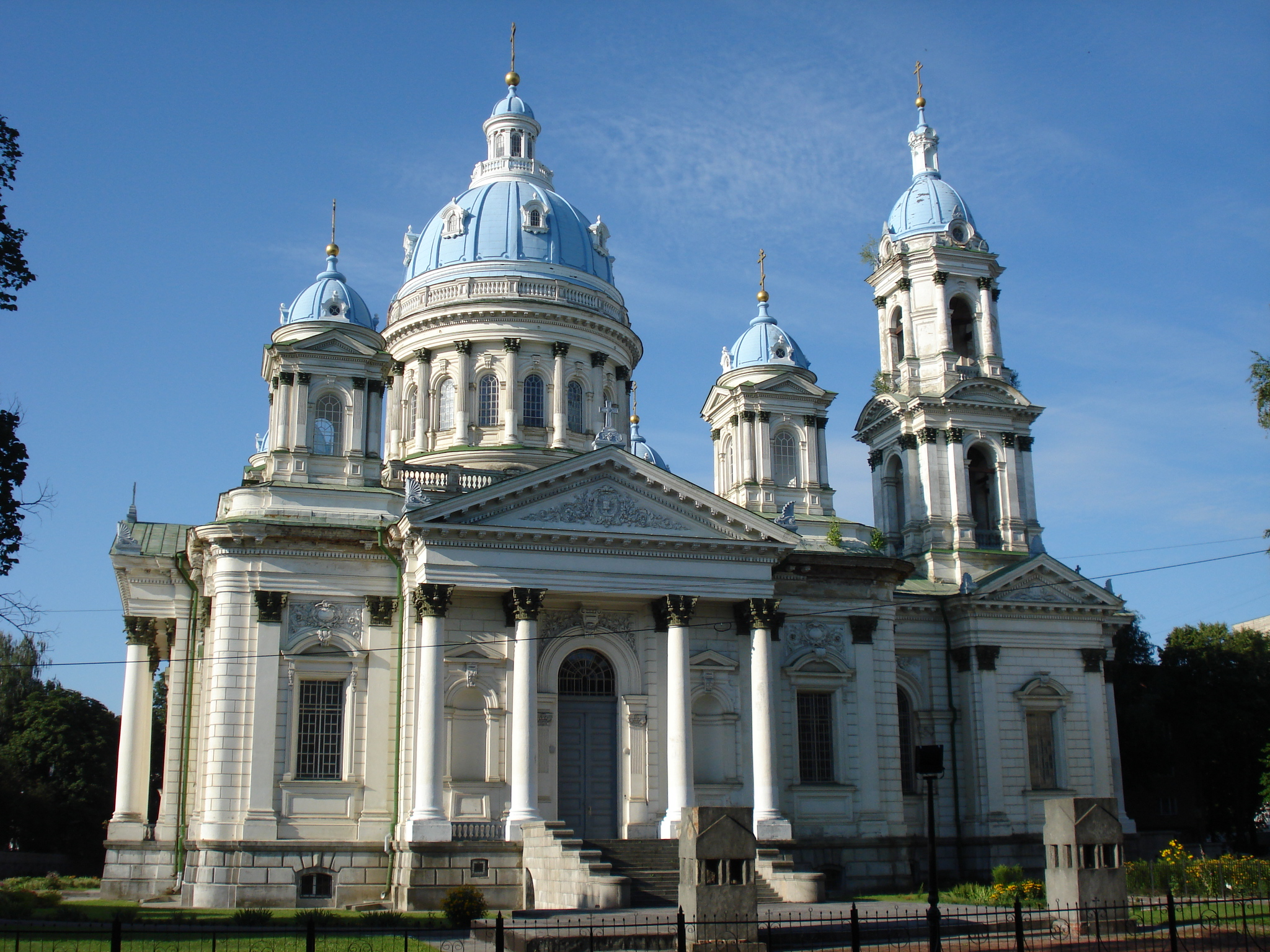 Троїцький собор (мур.), Суми, вул. Троїцька, 34